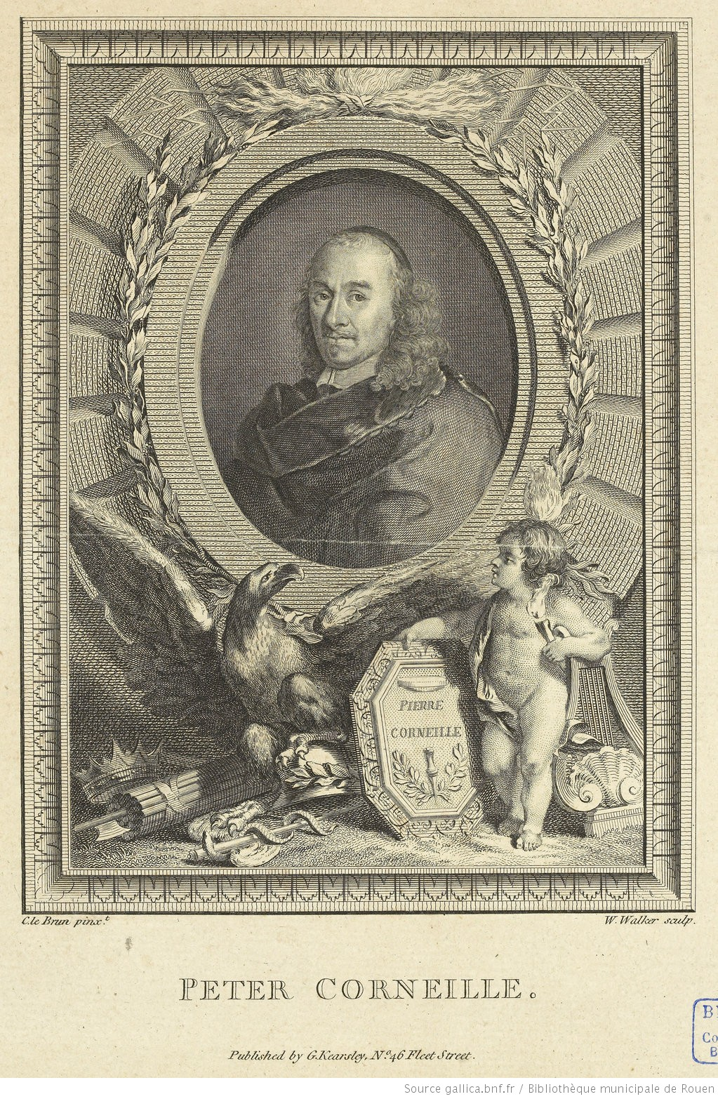 Peter Corneille [ Pierre Corneille ], gravure à l'eau-forte et burin de William Walker d'après Charles Le Brun (158 x 118 mm, n. d.)